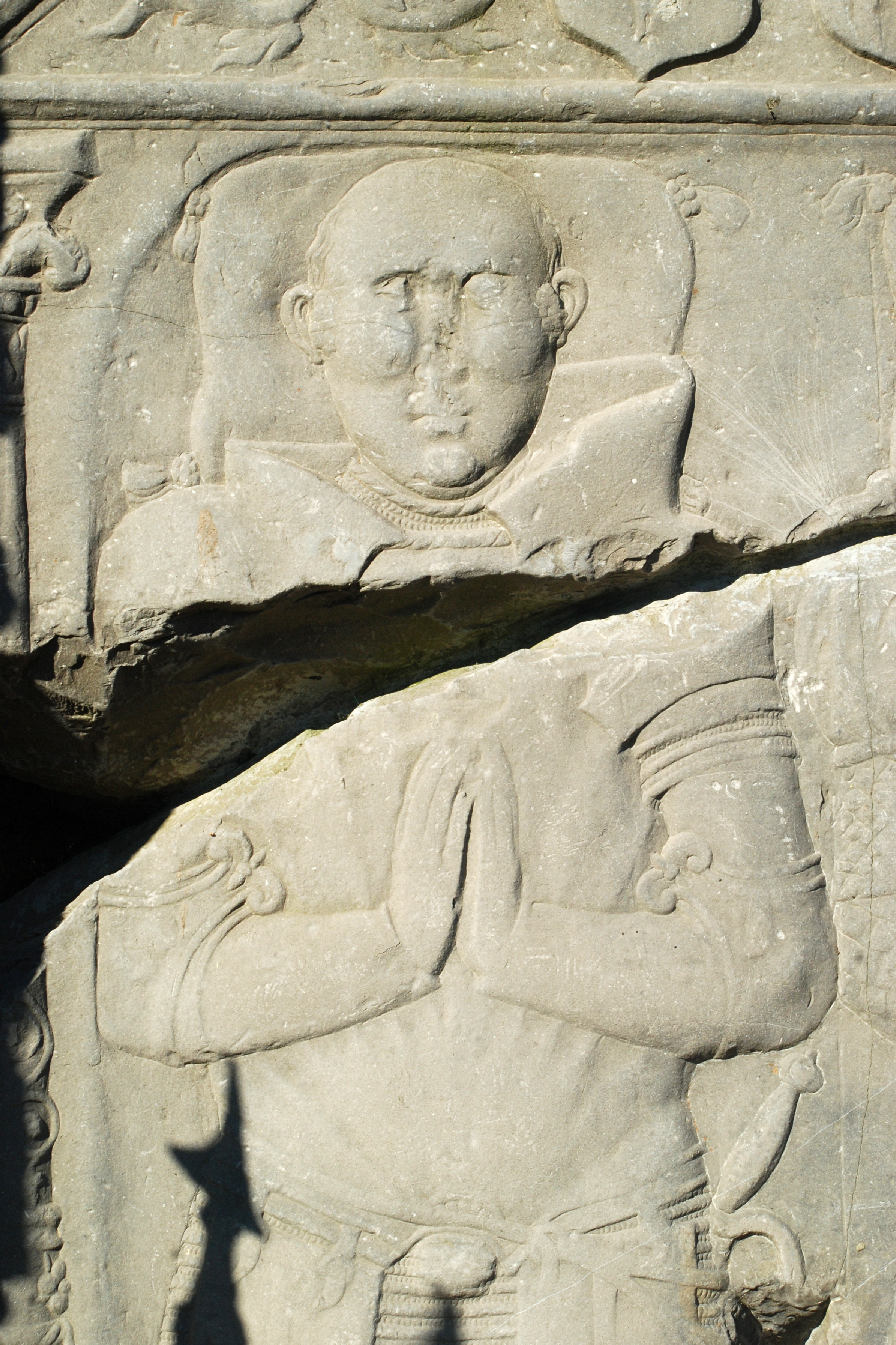 Belgique - Brabant wallon - Jodoigne - Saint-Remy-Geest - Église Saint-Remy